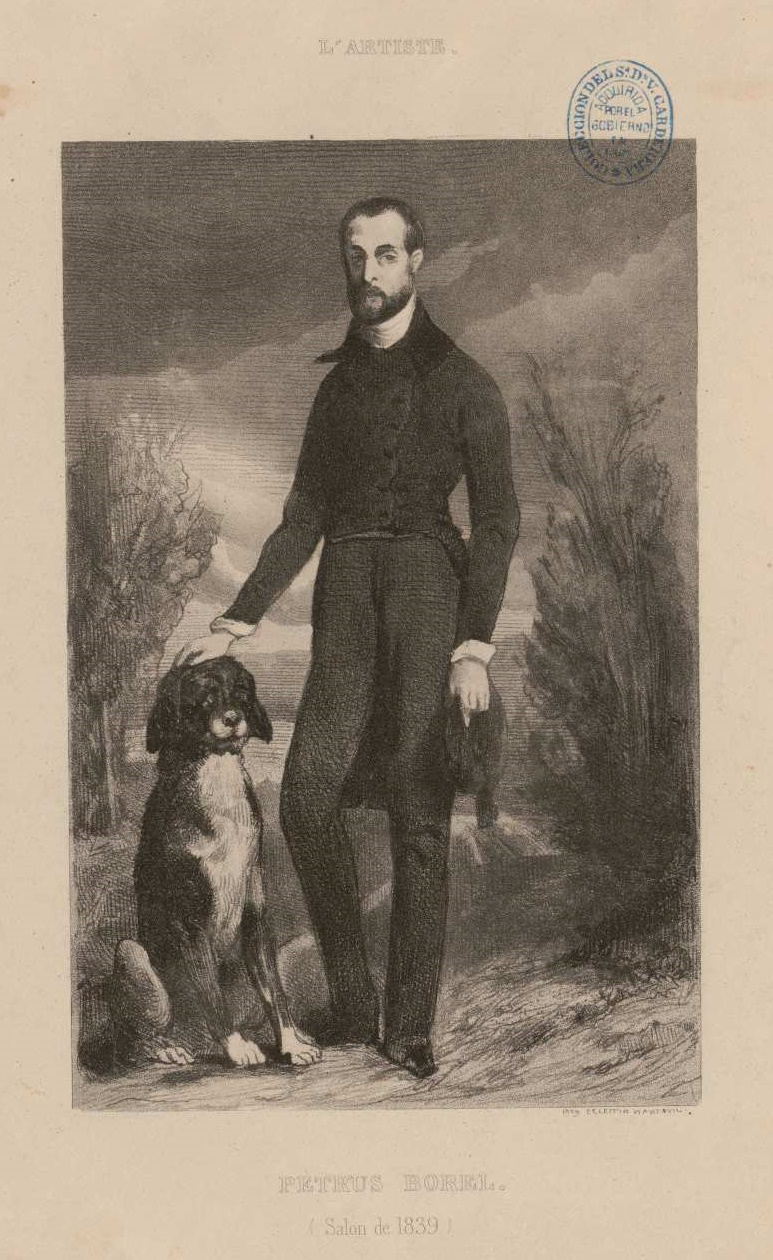 Petrus Borel, grabado calcográfico de Célestin Nanteuil a partir de un retrato de Louis Boulanger, cuadro presentado en el Salon de 1839. Ilustración de L'Artiste : journal de la littérature et des beaux -arts